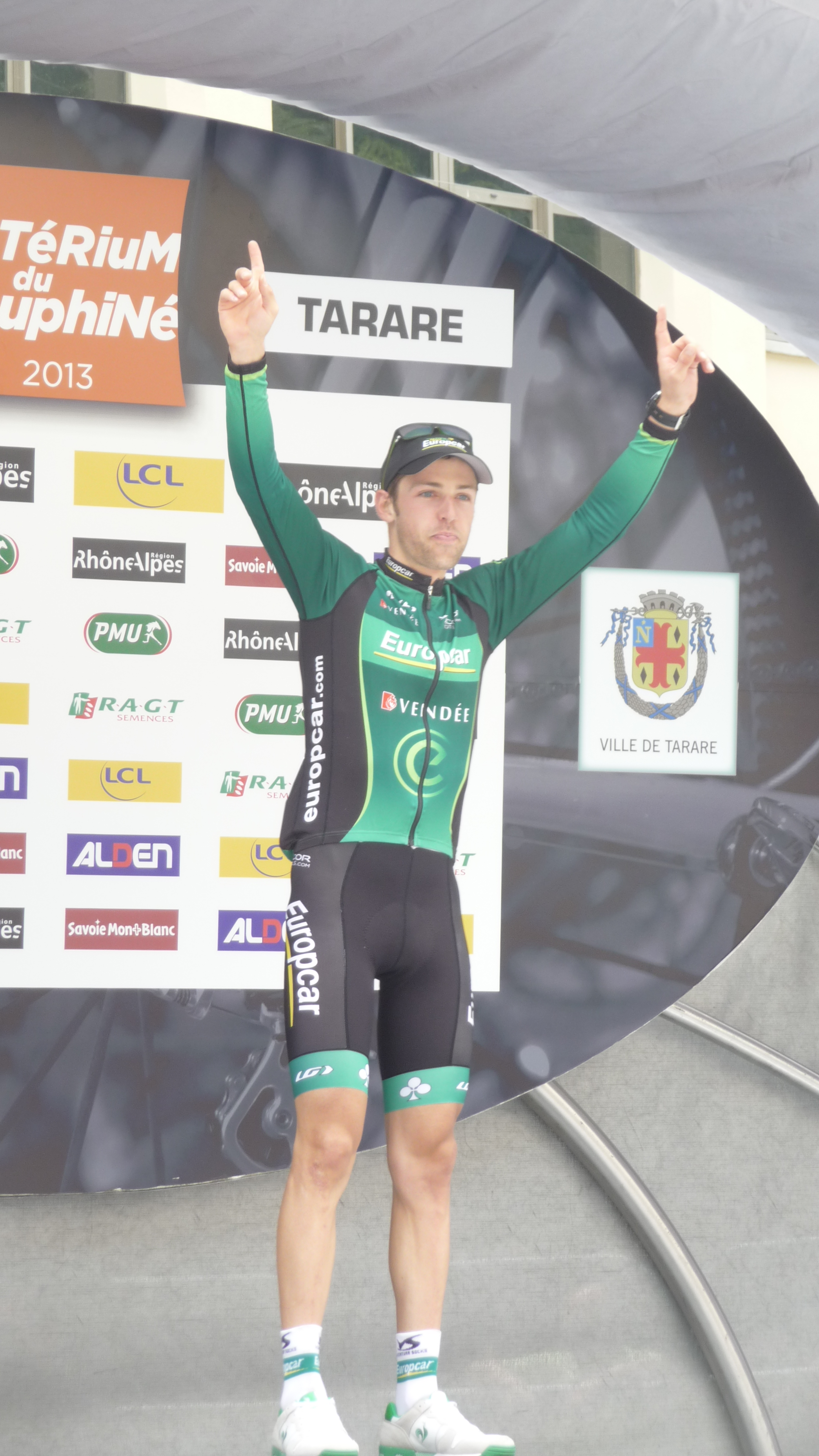 Arrivée de la 3e étape du Critérium du Dauphiné 2013 à Tarare le mardi 4 juin 2013. Podium de la 3e étape à Tarare, maillot jaune David Veilleux